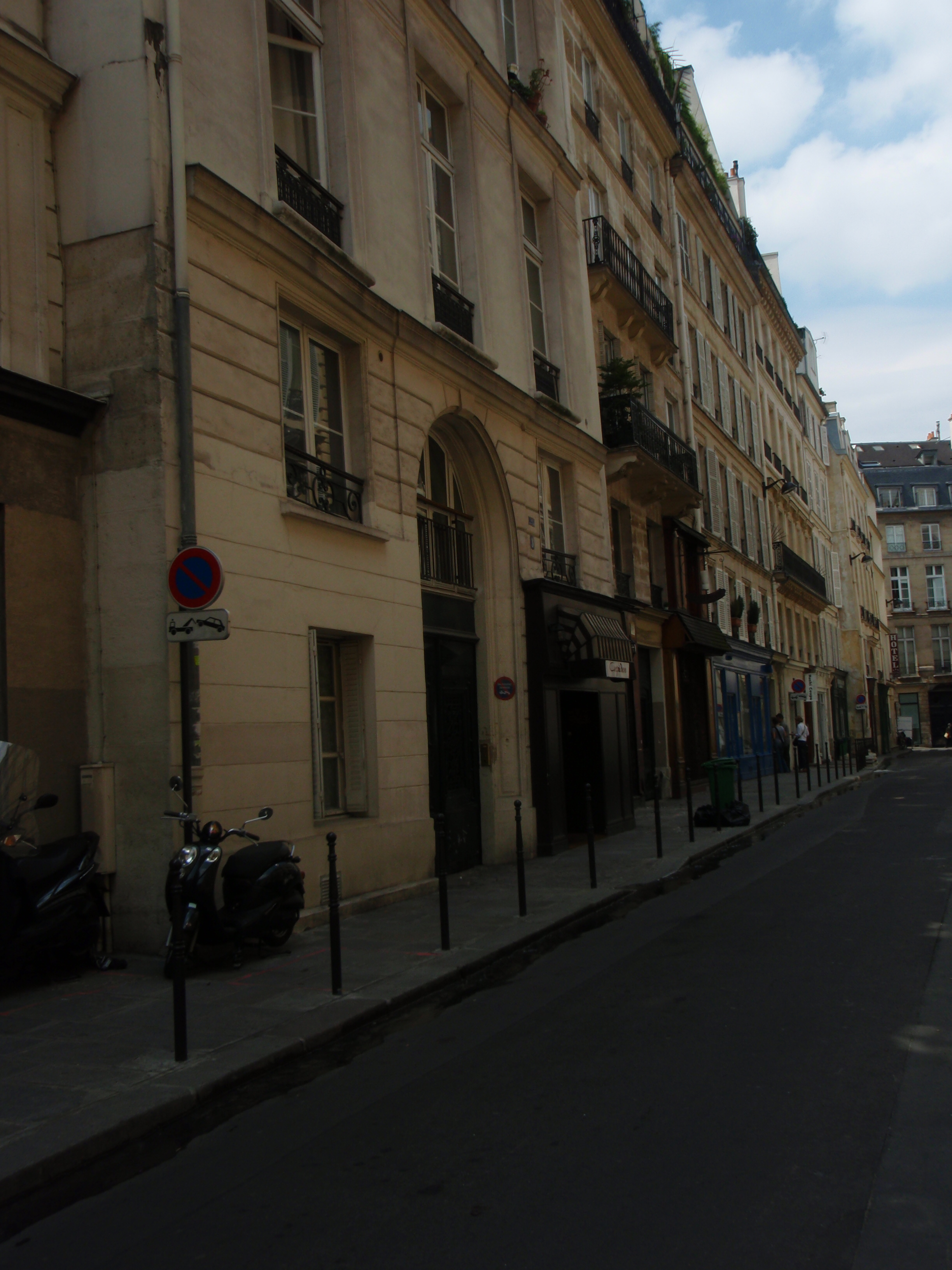 Rue Villedo à Paris en juin 2008